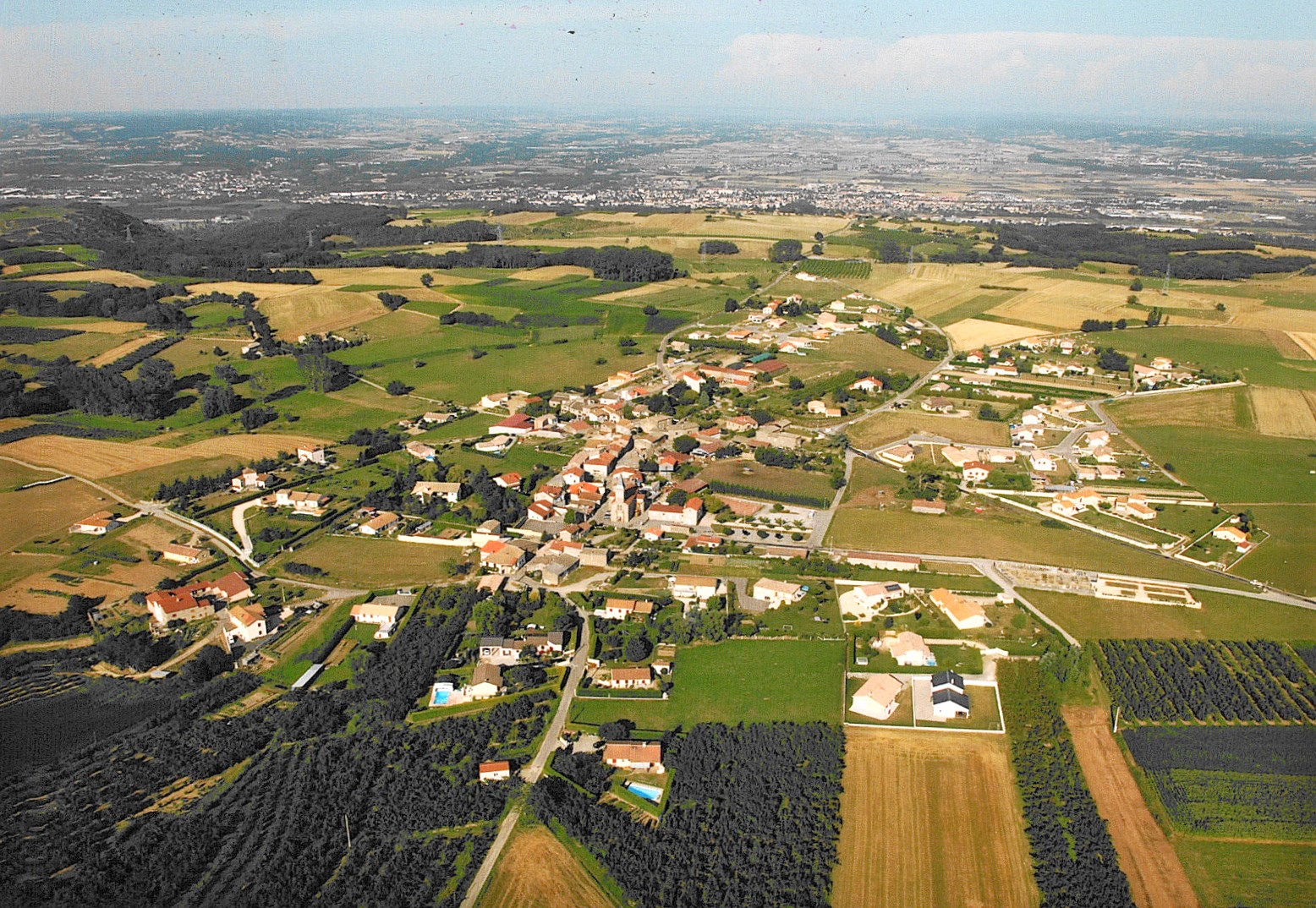 Bogy détail